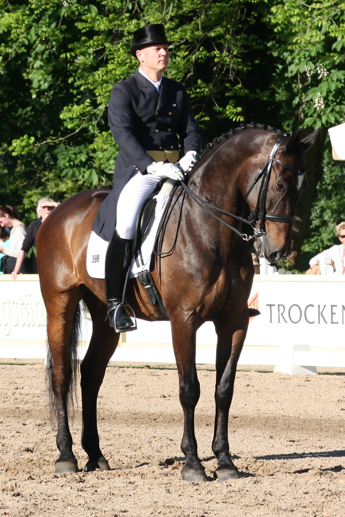 77. Internationales Pfingstturnier Wiesbaden 2013, CDI **** Dressurprüfung Grand Prix de Dressage, Brühe,Christian mit Cinco de Mayo (Amerikanisches Warmblut [1]) Personality rights warning Although this work is freely licensed or in the public domain, the person(s) shown may have rights that legally restrict certain re-uses unless those depicted consent to such uses. In these cases, a model release or other evidence of consent could protect you from infringement claims.